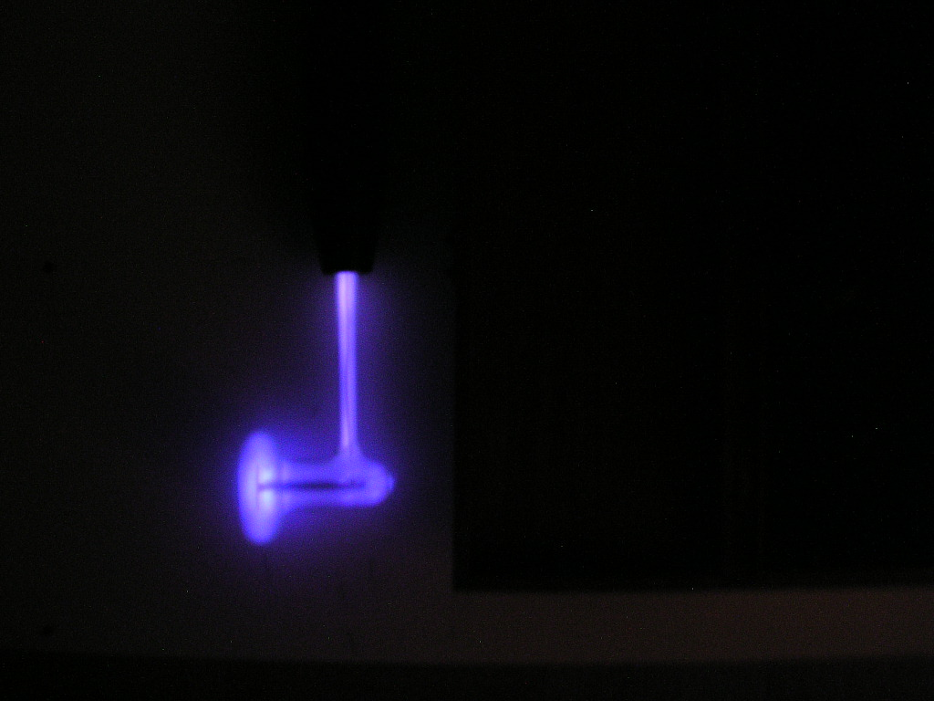 Hochfrequenz 309 ist die einzige Aufschrift auf diesem Gerät das mehr oder weniger lange vor 1956 gebaut wurde. Glas-Sonde mit violett leuchtendem Argon. Benutzer:Karl Bednarik fotografiert am 3. Dezember 2006